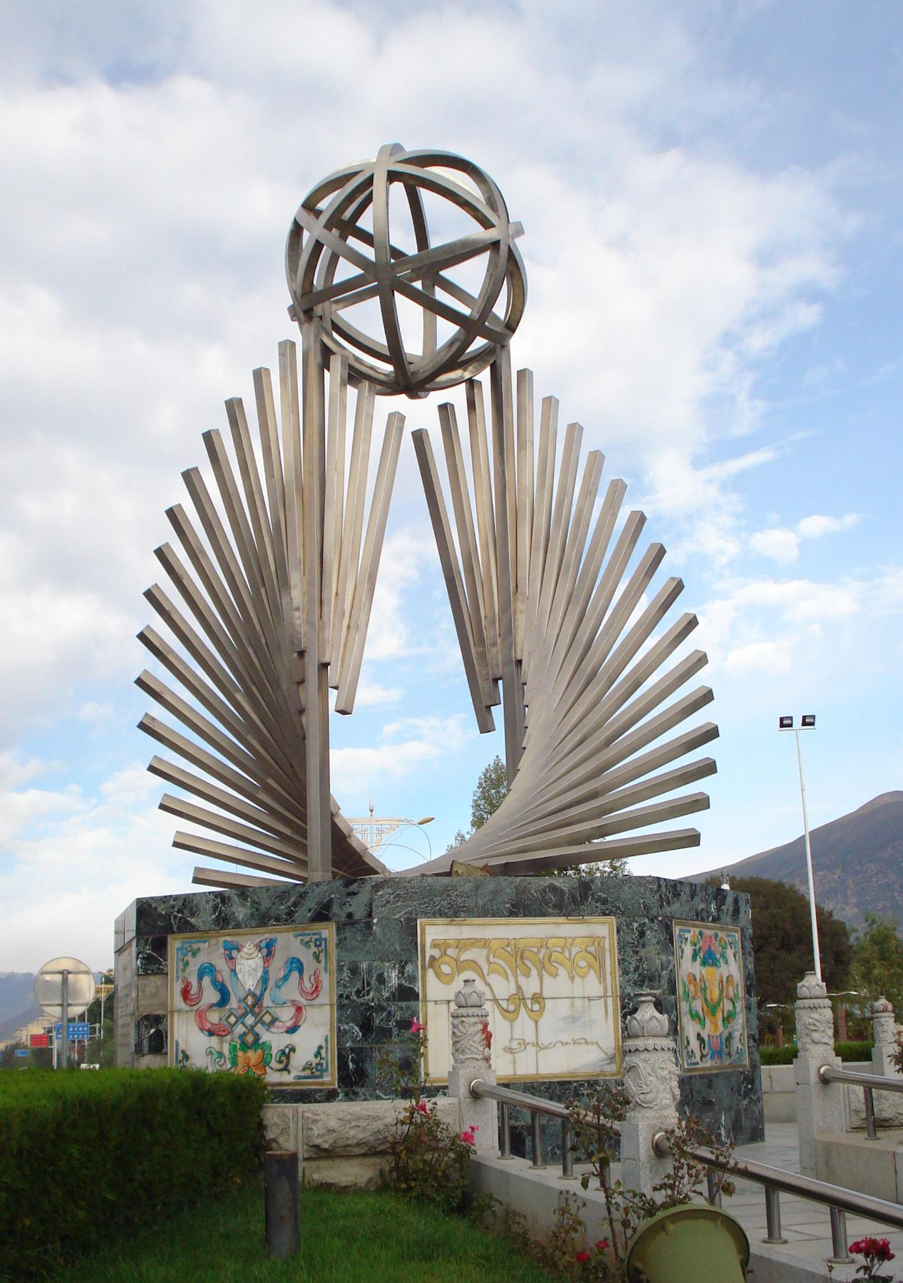 Tibet, Lhasa, unknown monument.